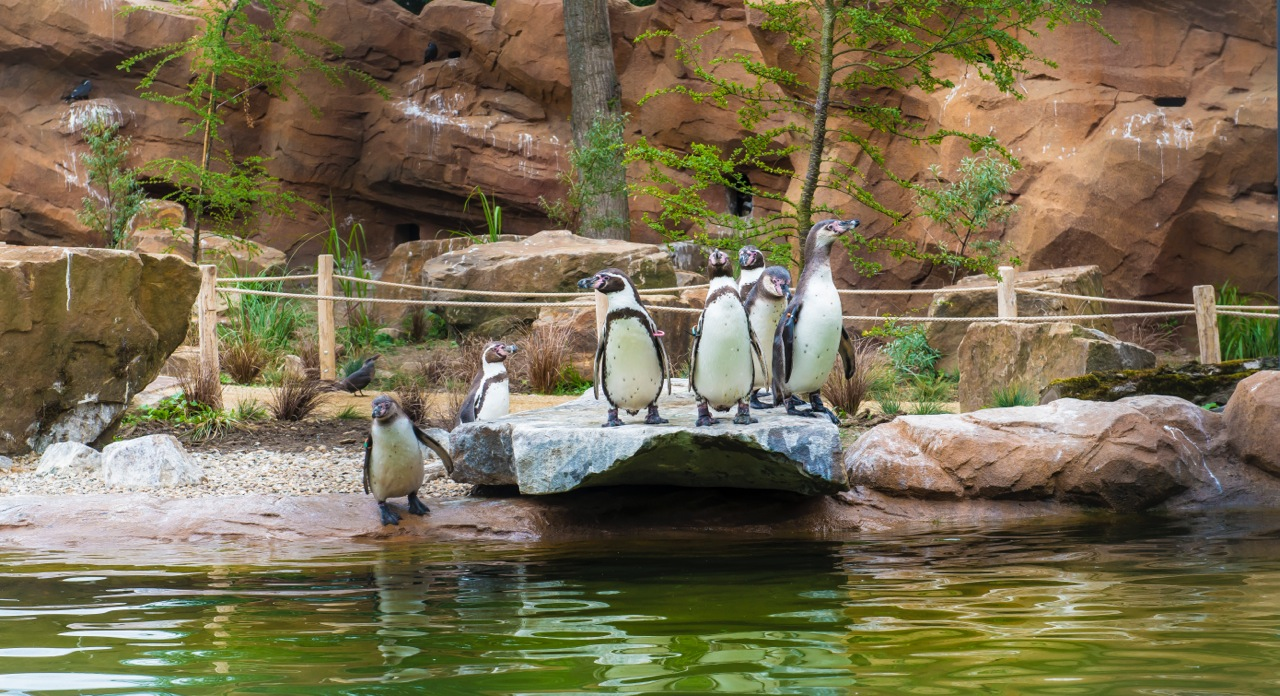 Der neue Pinguin Pool wurde Ostern 2014 eröffnet